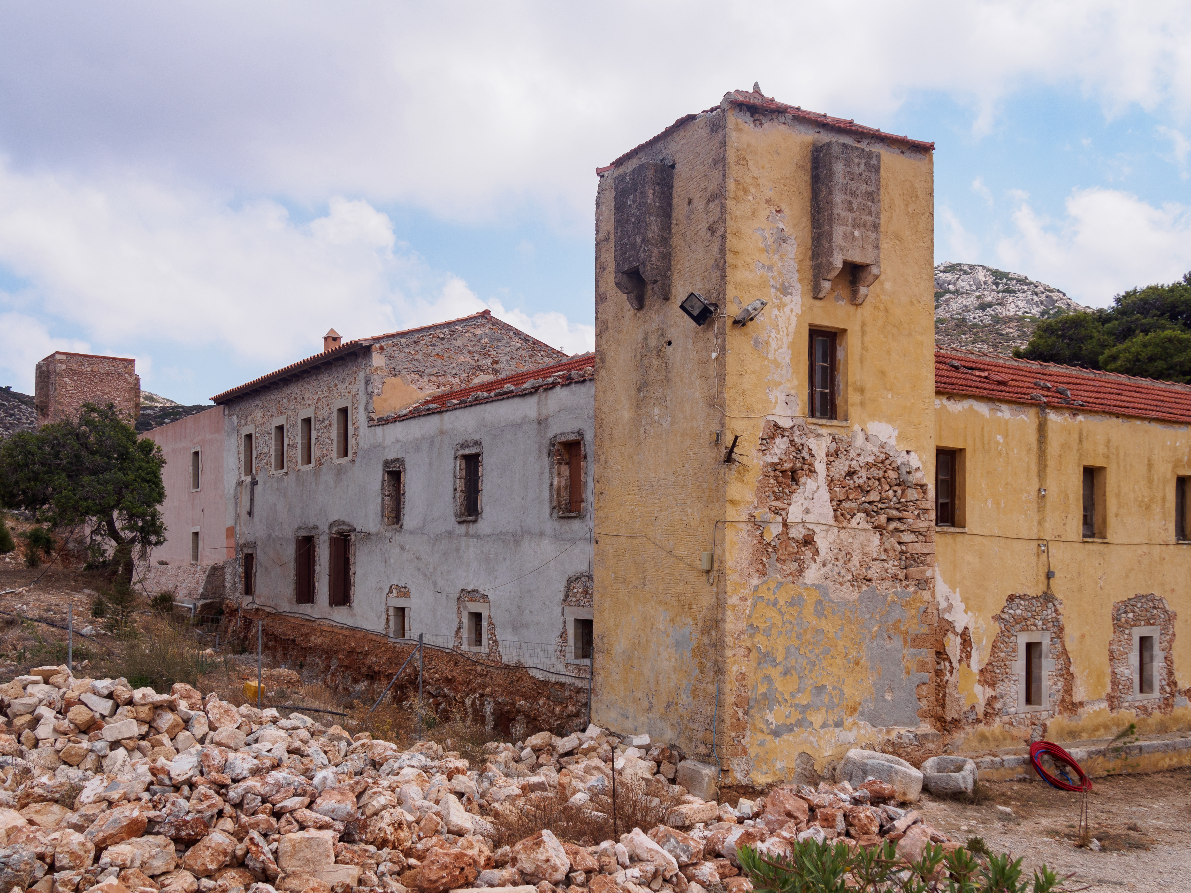 Μονή Γουβερνέτου«Μονή Γουβερνέτου»